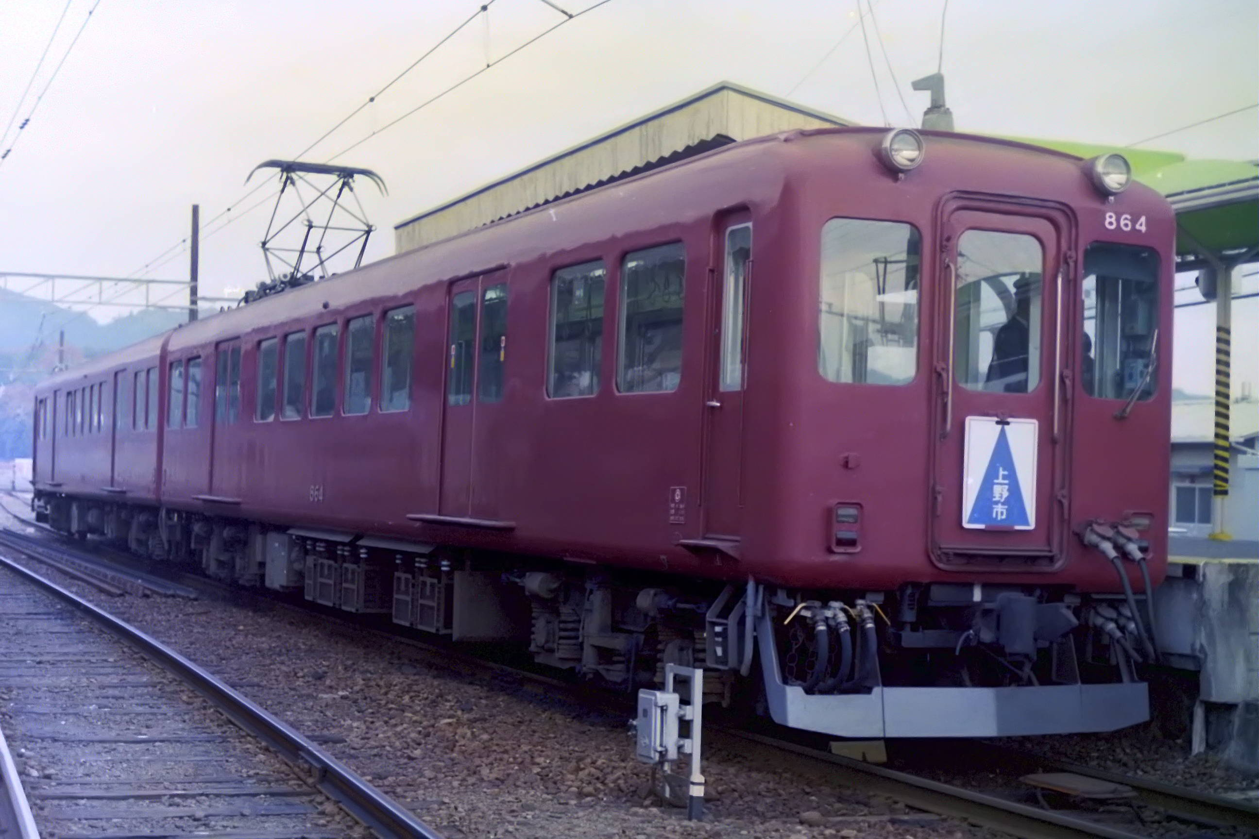 近鉄860系電車 1986年11月24日 伊賀神戸駅